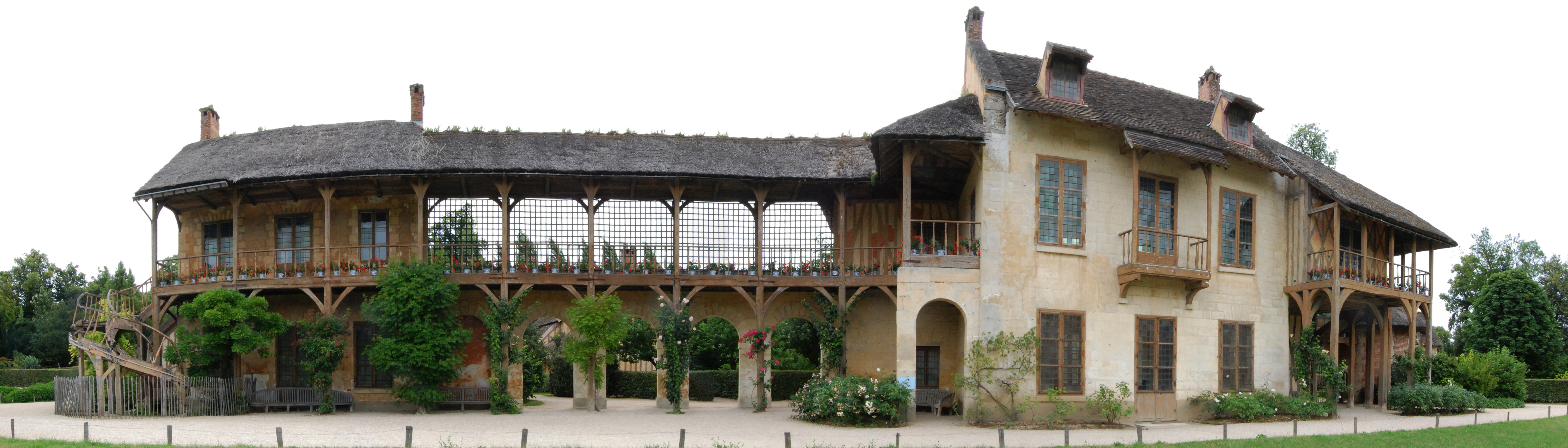 Maison de la Reine, dans le Hameau de la Reine